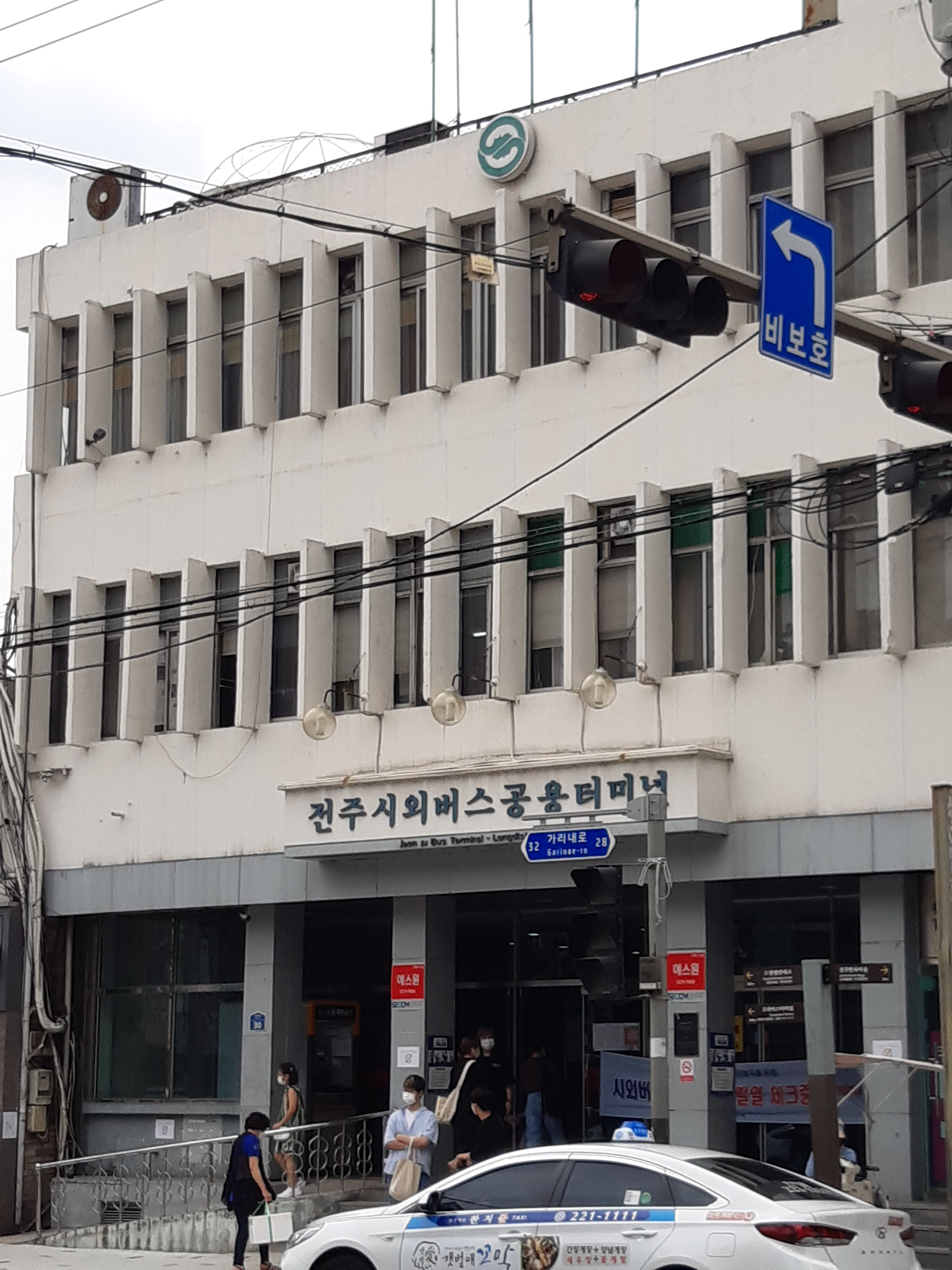 2020년 7월 11일 전주시외버스공용터미널